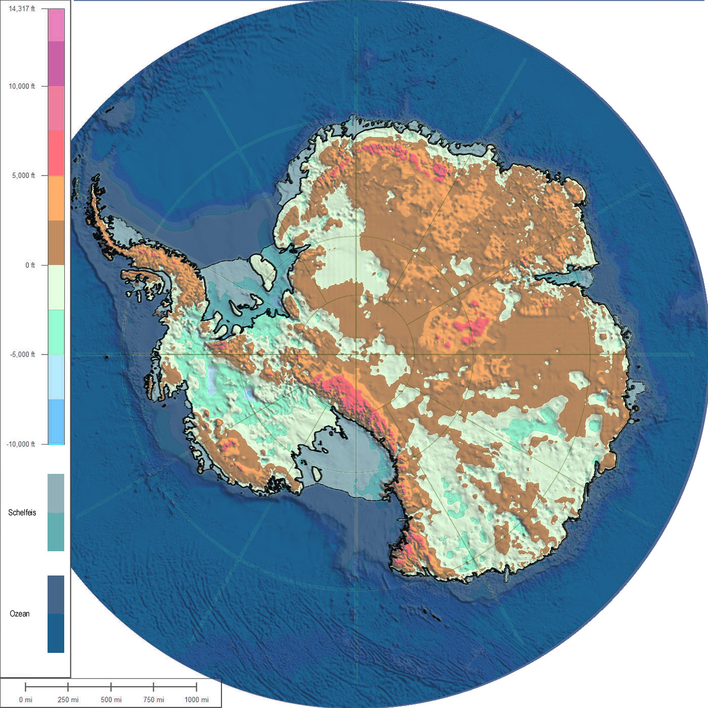 Karte der subglazialen Topografie und Bathymetrie der Antarktis. Zur besseren visuellen Abgrenzung von Ozean, Schelfeis und Land wurden die Ozeangebiete dukelblau und die Schelfeisgebiete mittelblau abgedunkelt. Jede Farbstufe entspricht 2.500 Fuß (762 m). Die dicke durchgezogene Linie zeigt den Umriss von Antarktika, die dünne gestrichelte Linie das Schelfeis. Entwurf zur Diskussion der Karte in der Wikipedia-Kartenwerkstatt.